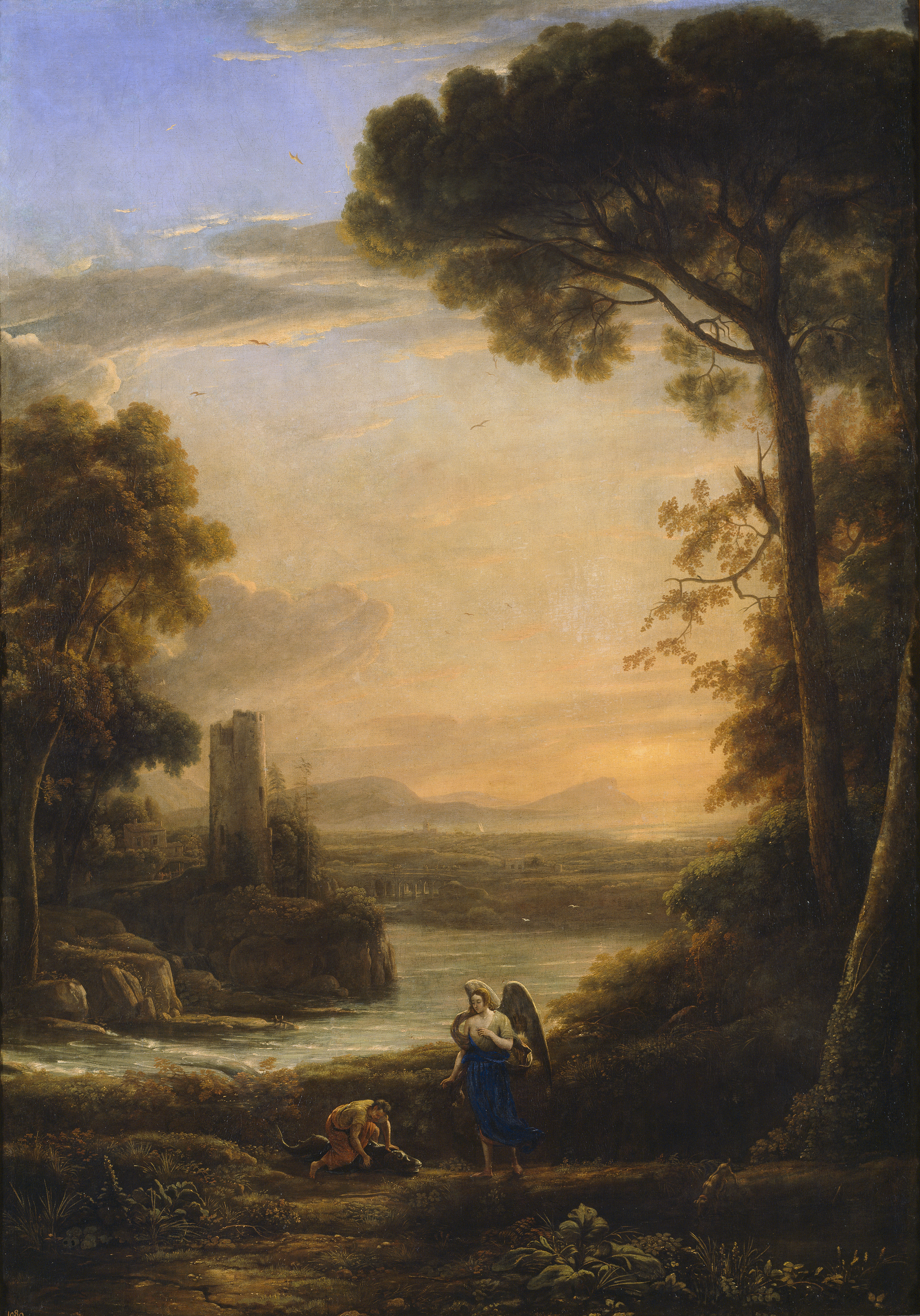 Paisaje con Tobías y el Arcángel Rafael, Claude Lorrain, Museo del Prado, Madrid.